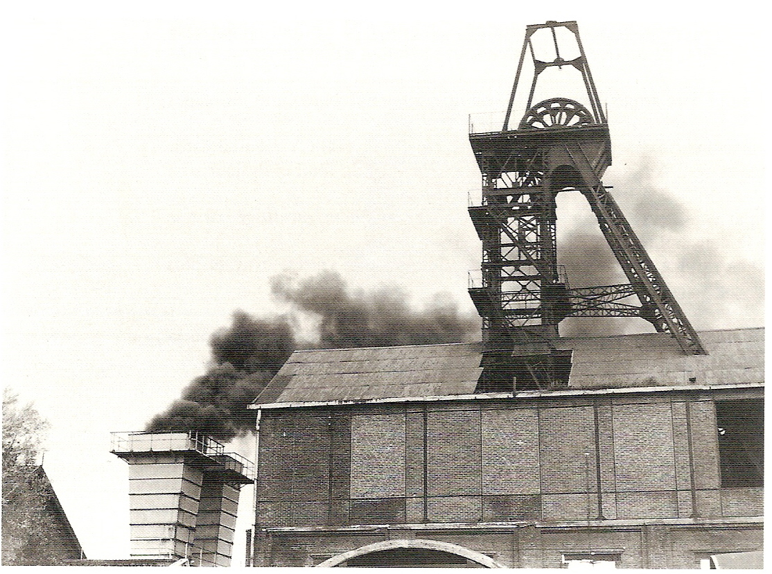 La Fosse n° 6 de la Compagnie des mines de l'Escarpelle était un charbonnage constitué d'un seul puits situé à Leforest, Pas-de-Calais, Nord-Pas-de-Calais, France. L'image a été prise le 7 novembre 1984. La fumée qui sort de la buse de ventilation provient d'un incendie survenu dans le bâtiment lors du démantèlement.